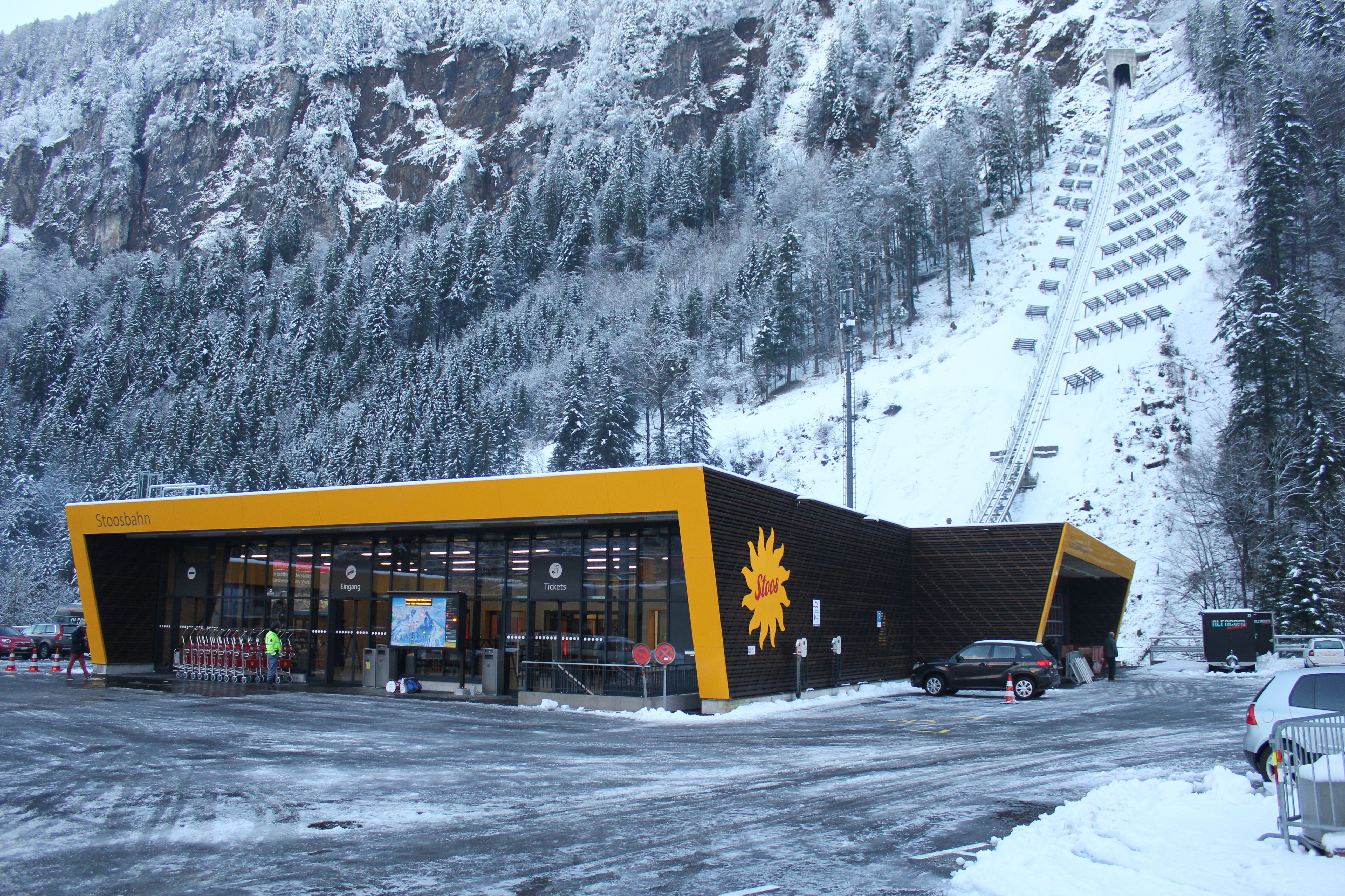 Fertiges Gebäude der Talstation vor der Eröffnung